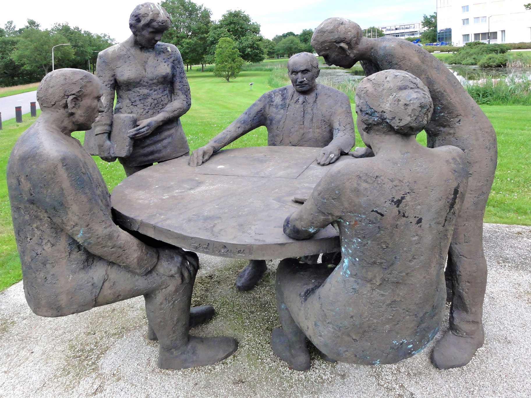 Deliberation-Overleg door Bert Kiewiet nabij NAM-gebouw aan de Schepersmaat te Assen